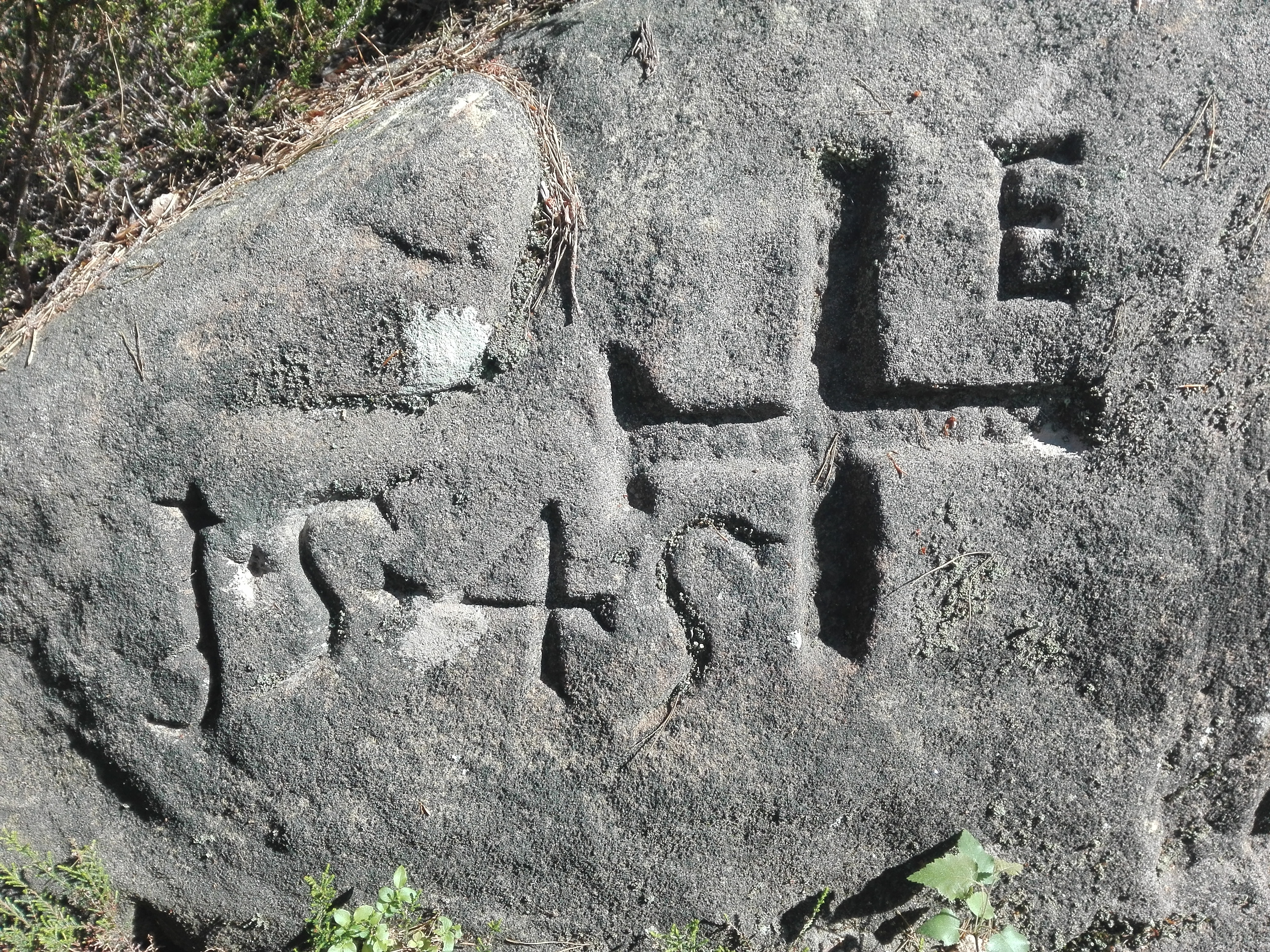 Loogfels am Cyriakusweg, bezeichnet 1545; markierte die Grenze zwischen Deidesheim und Gimmeldingen (früher Hirschorn-Lindenberg)